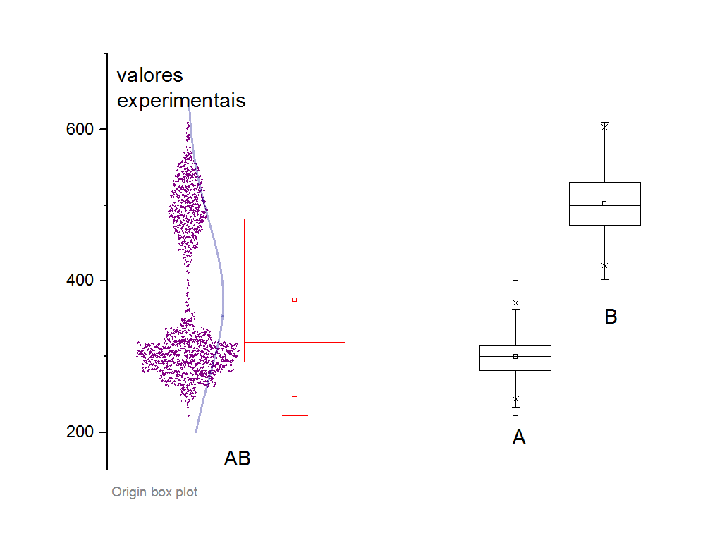 Diagramas de caixa podem identificar diferenças entre grupos. Dados de dois grupos distintos foram mesclados e os diagramas de caixas dos 3 conjuntos mostram como os dados pertencem a grupos distintos.